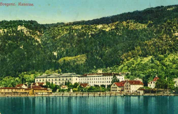 k.u.k. Infanteriekaserne in Bregenz